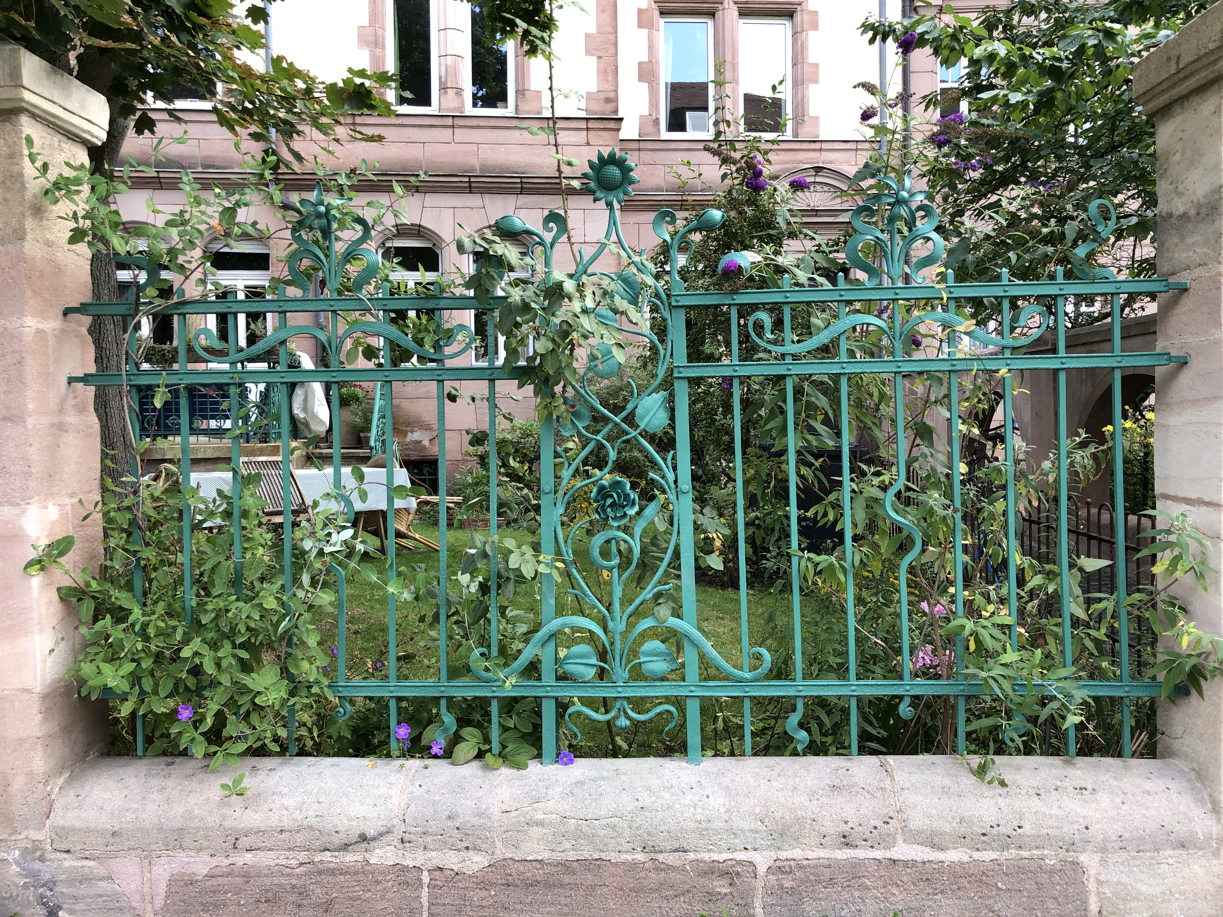 Zaunanlage des MFH Rennweg 72 in Nürnberg